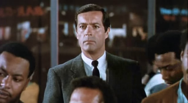 Frederick Stafford dans la bande-annonce du film Topaz en 1969.